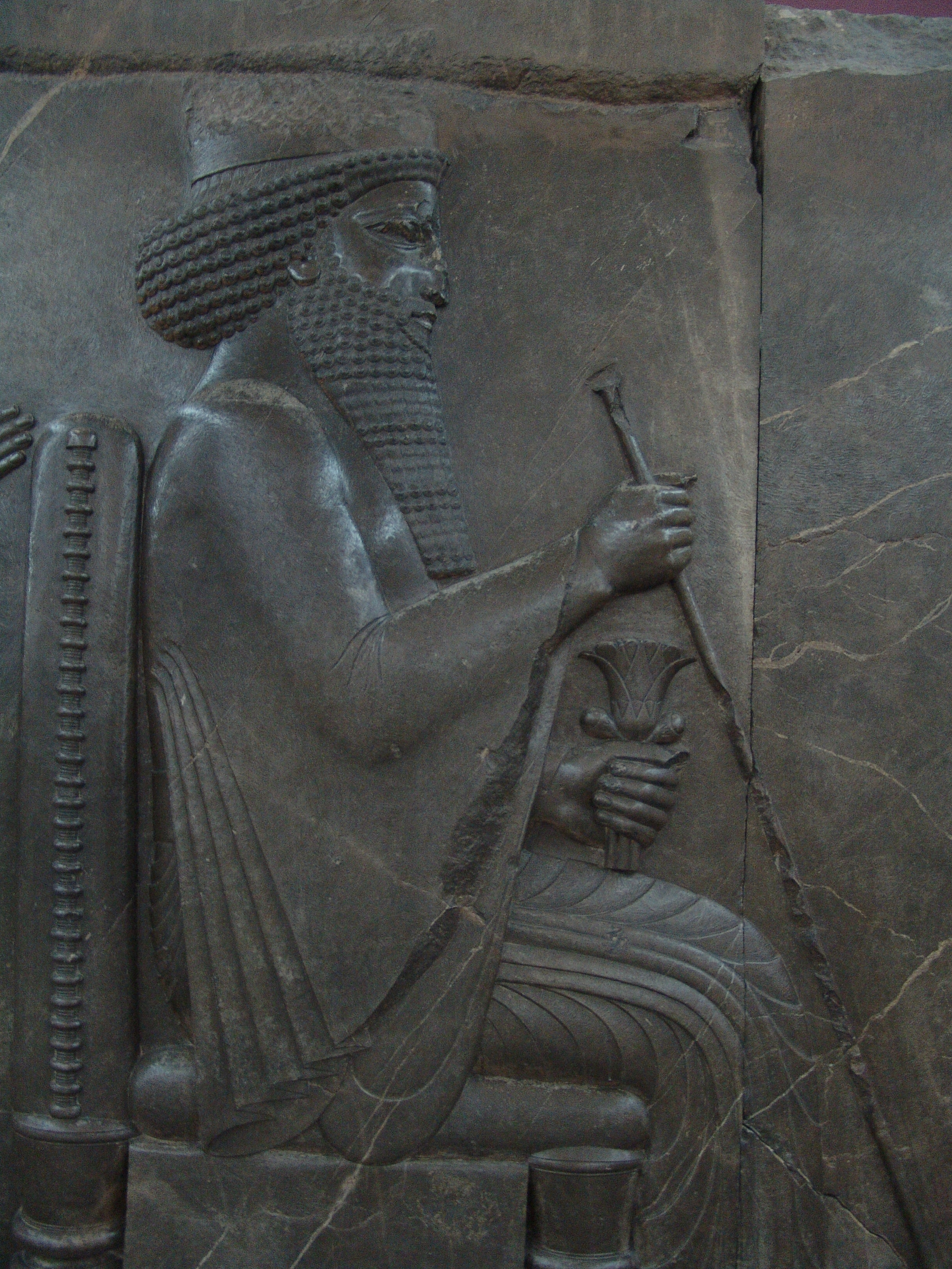 نقش بار عام داریوش. کشف‌شده در تخت جمشید. موجود در موزهٔ ایران باستان